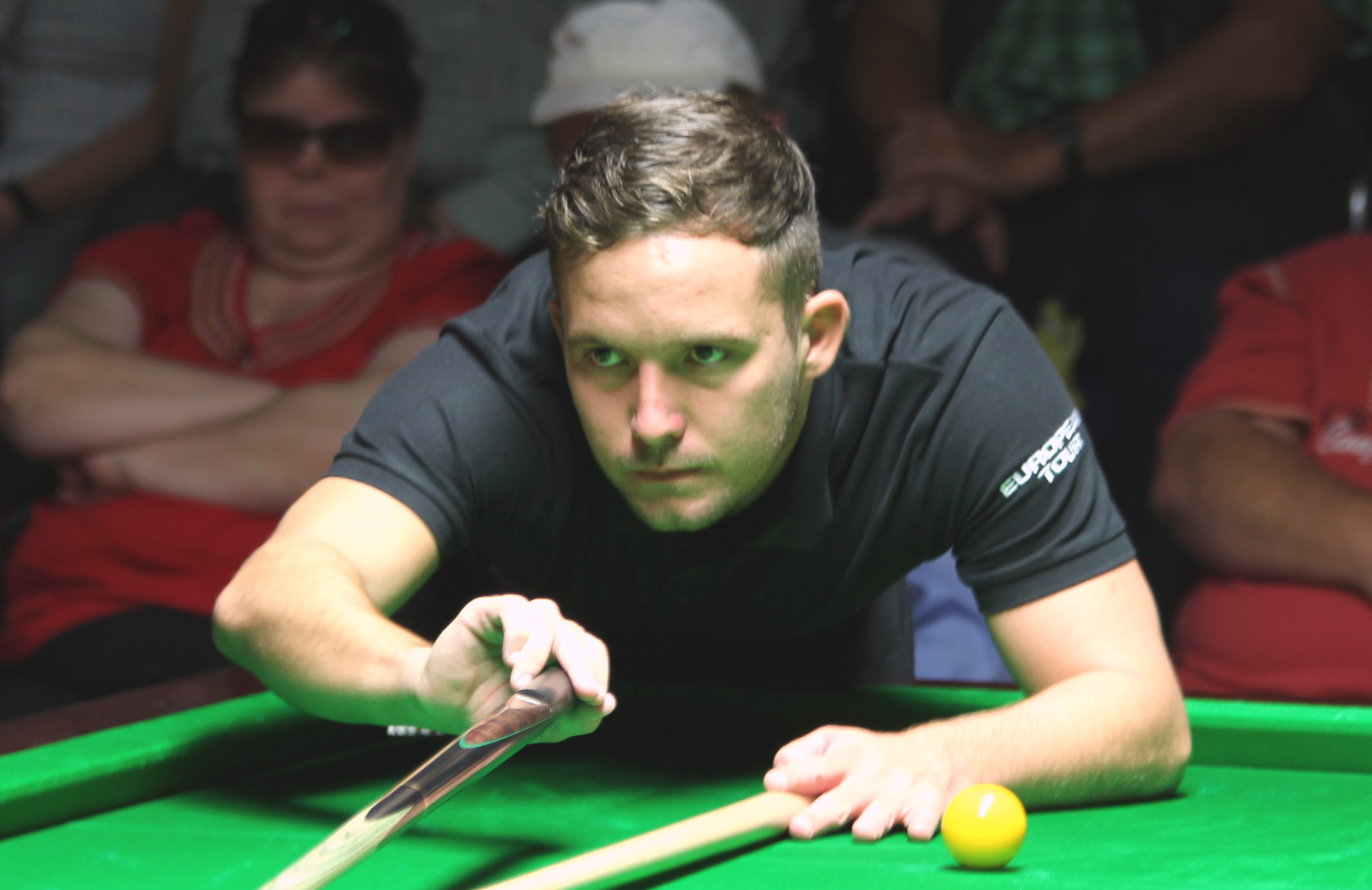 Jamie Jones beim Paul Hunter Classic 2013